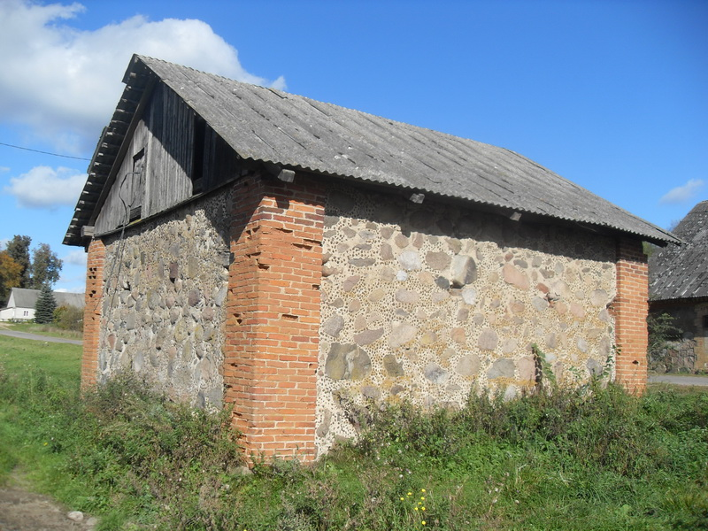 Міхайлоўшчына. Спіртасховішча